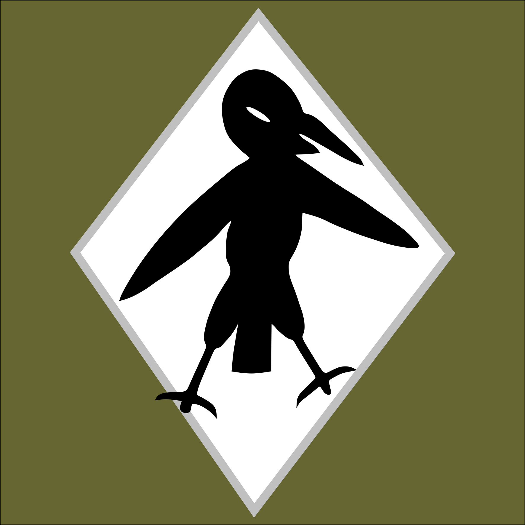 Znak malowany na samolotach PWS-10 - 131 eskadry myśliwskiej, stosowany w latach 1927 - 1932